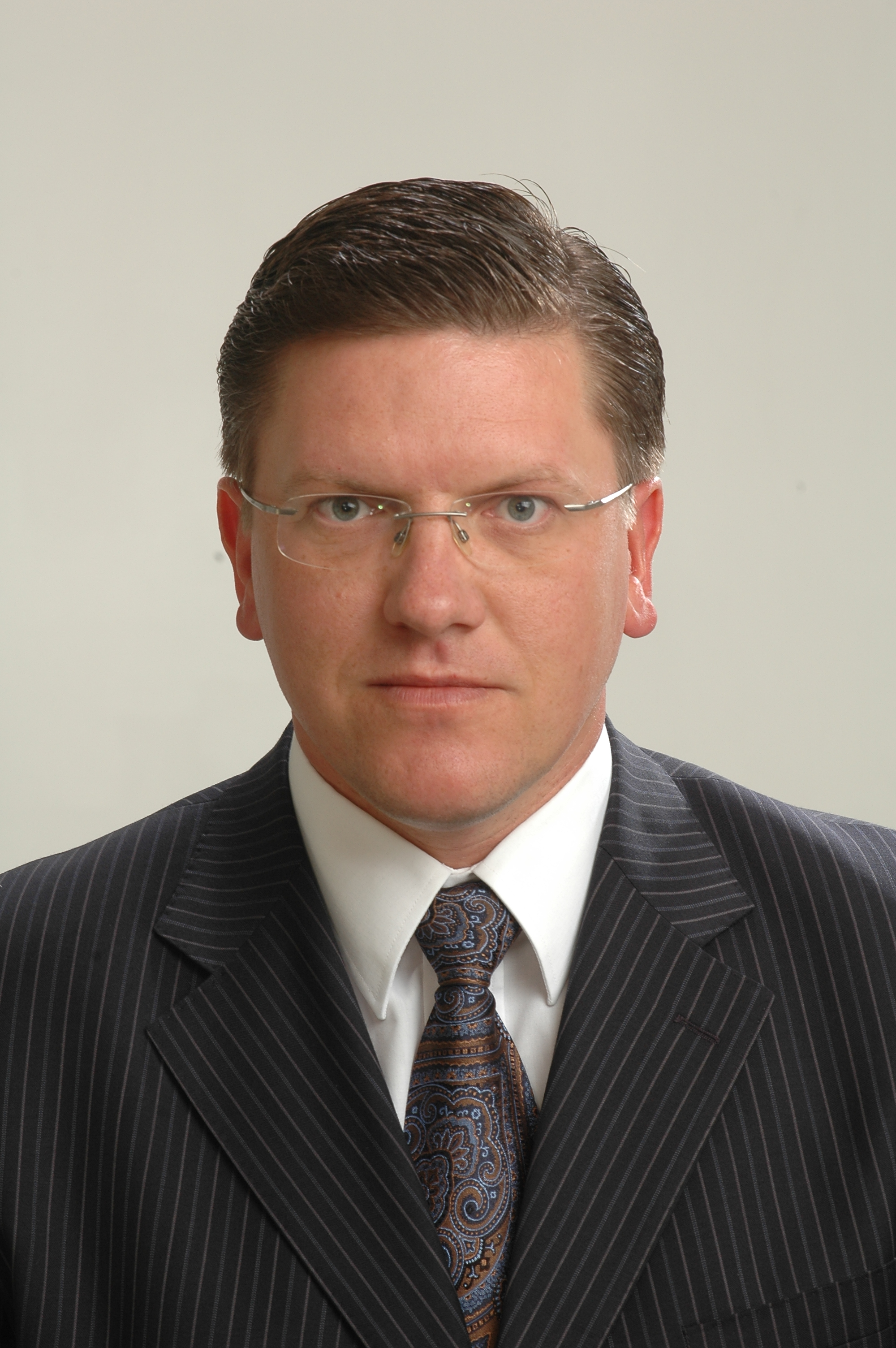 Foto: Saeima